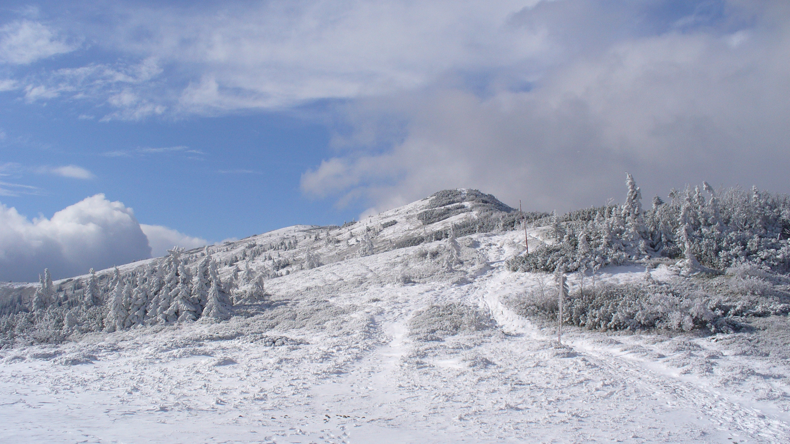 Mała Babia Góra - widok z przełęczy Brona / Mount Mała Babia Góra - view from Brona mountain pass (Żywiec Beskids, Poland)